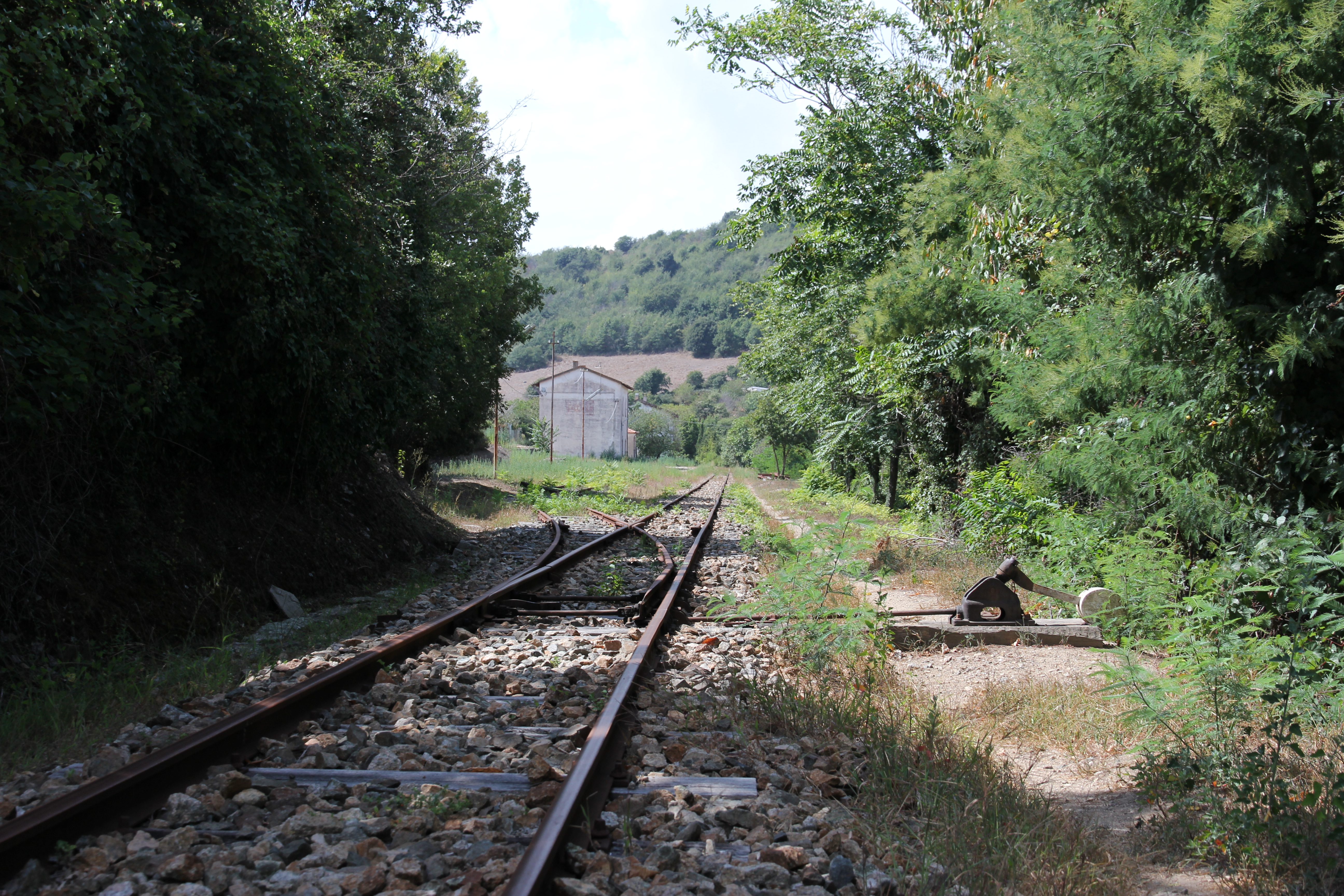 Aggius - Stazione ferroviaria